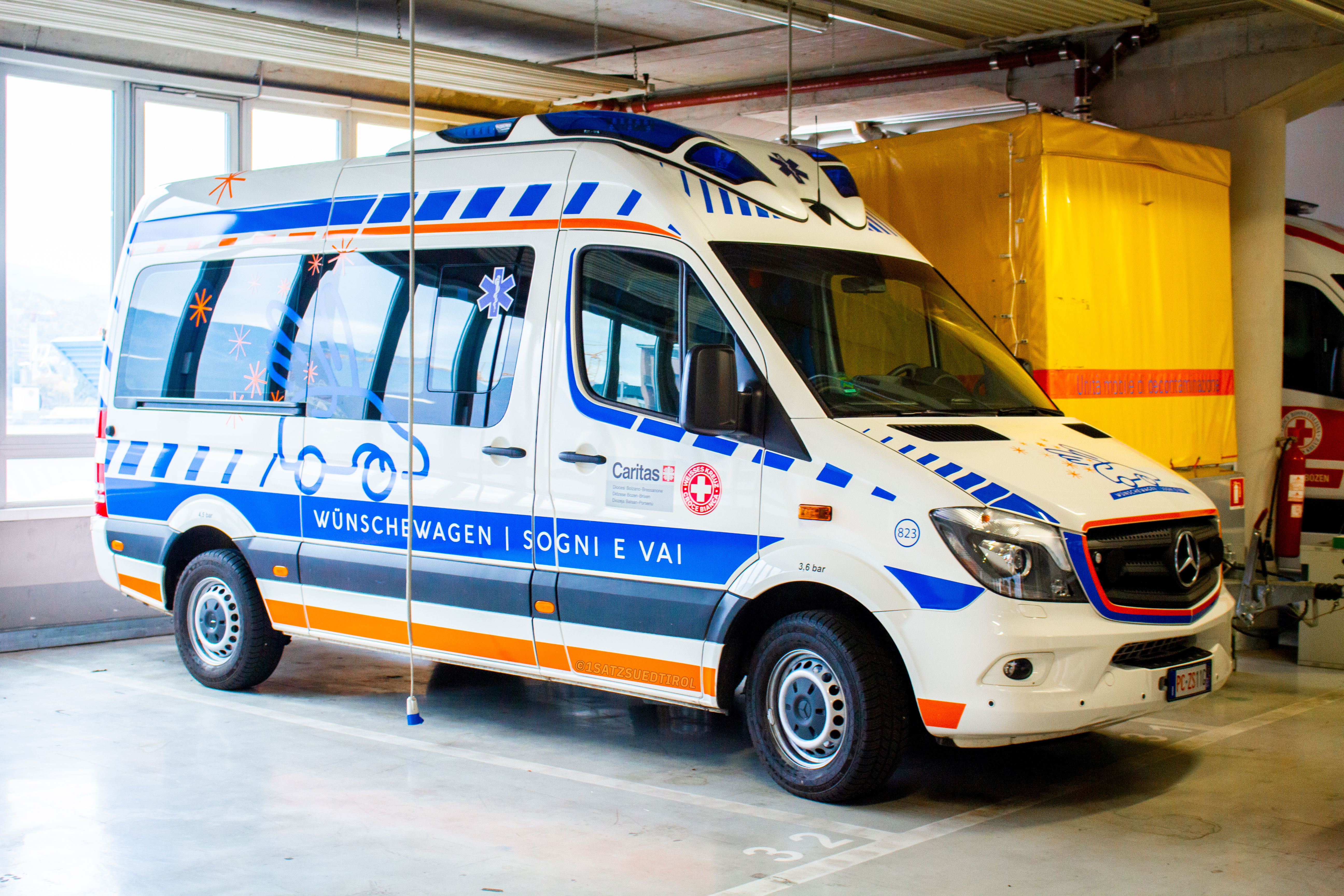 Wünschewagen (Weißes Kreuz)